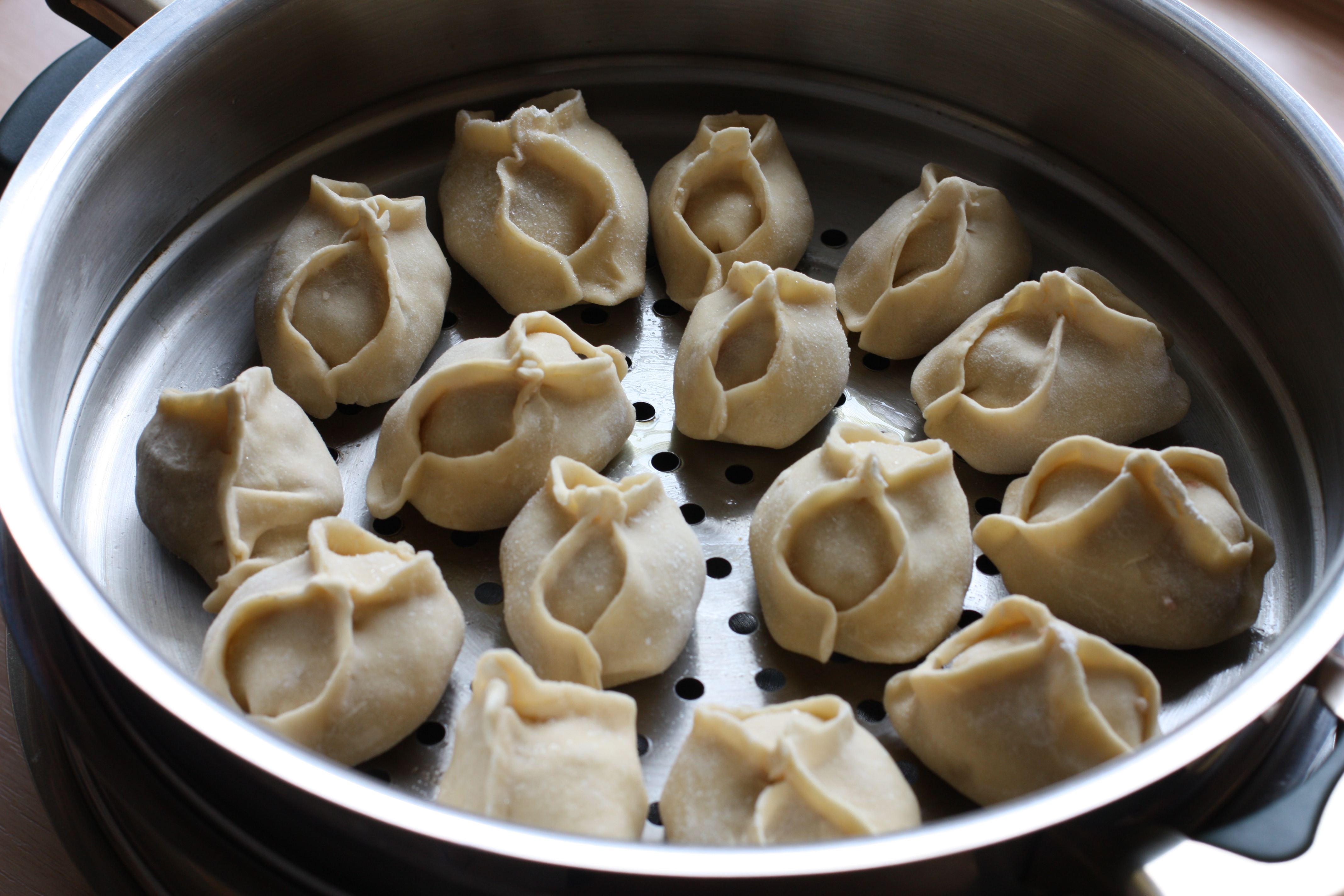 Manti, hausgemacht, eingefrohren, im speziellen mehrstöckigen Dampftopf, Manti-Topf, mit scharfer roter Soße